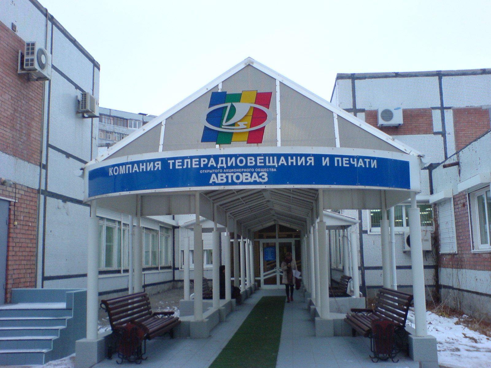 Центральный вход в компанию телерадиовещания и печати ОАО "АвтоВАЗ"